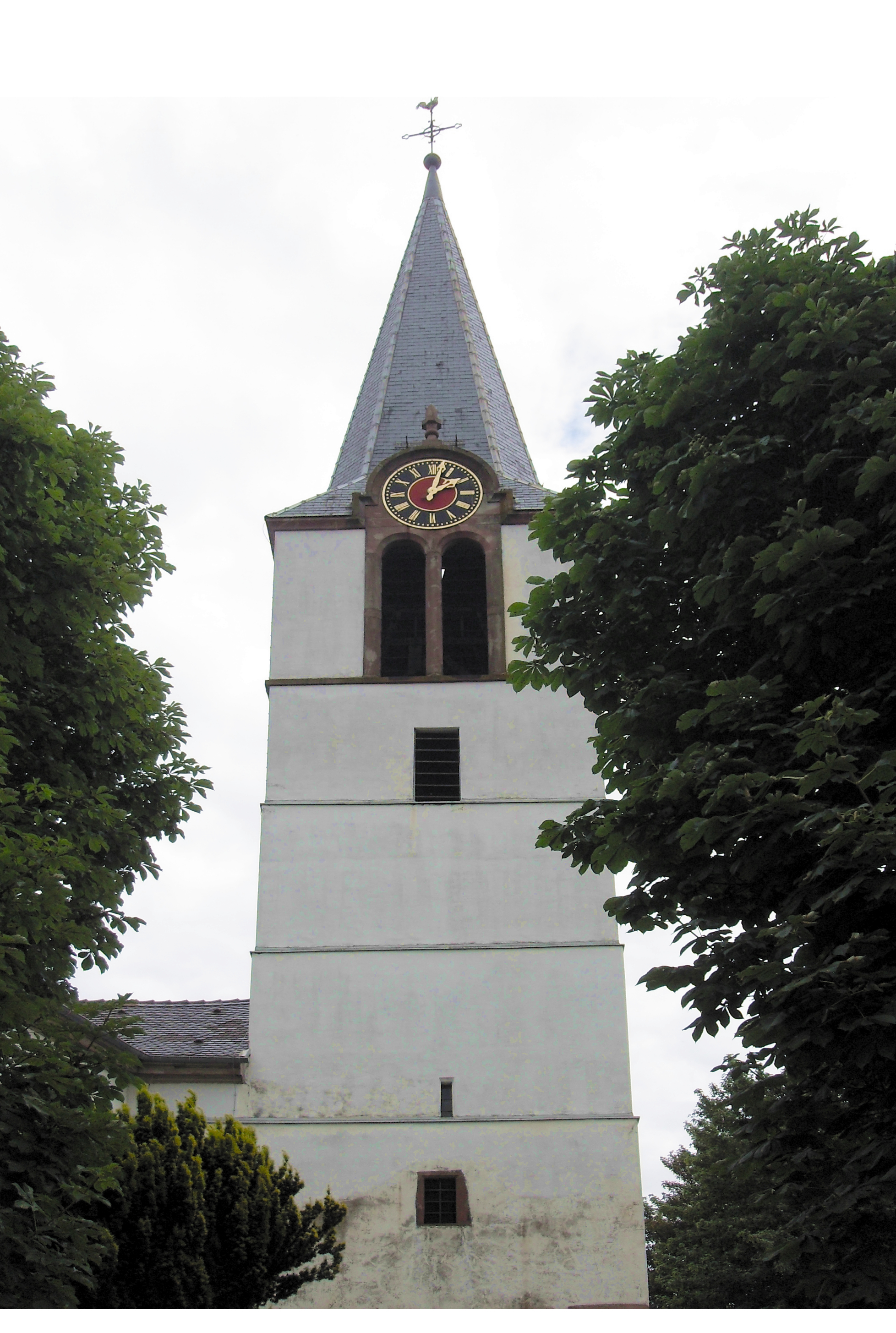 La tour de l'église Saint-Georges d'Achenheim